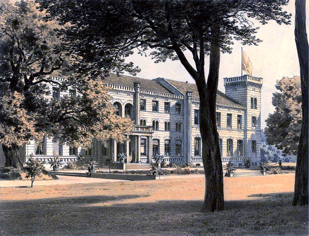 Pałac w Potulicach